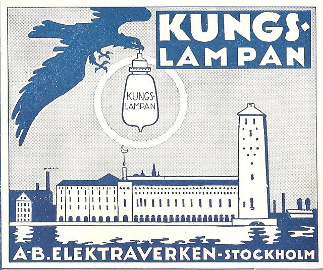 Reklam för Elektraverkens Kungslampan med ett ofullbordat Stockholms stadshus i bakgrunden